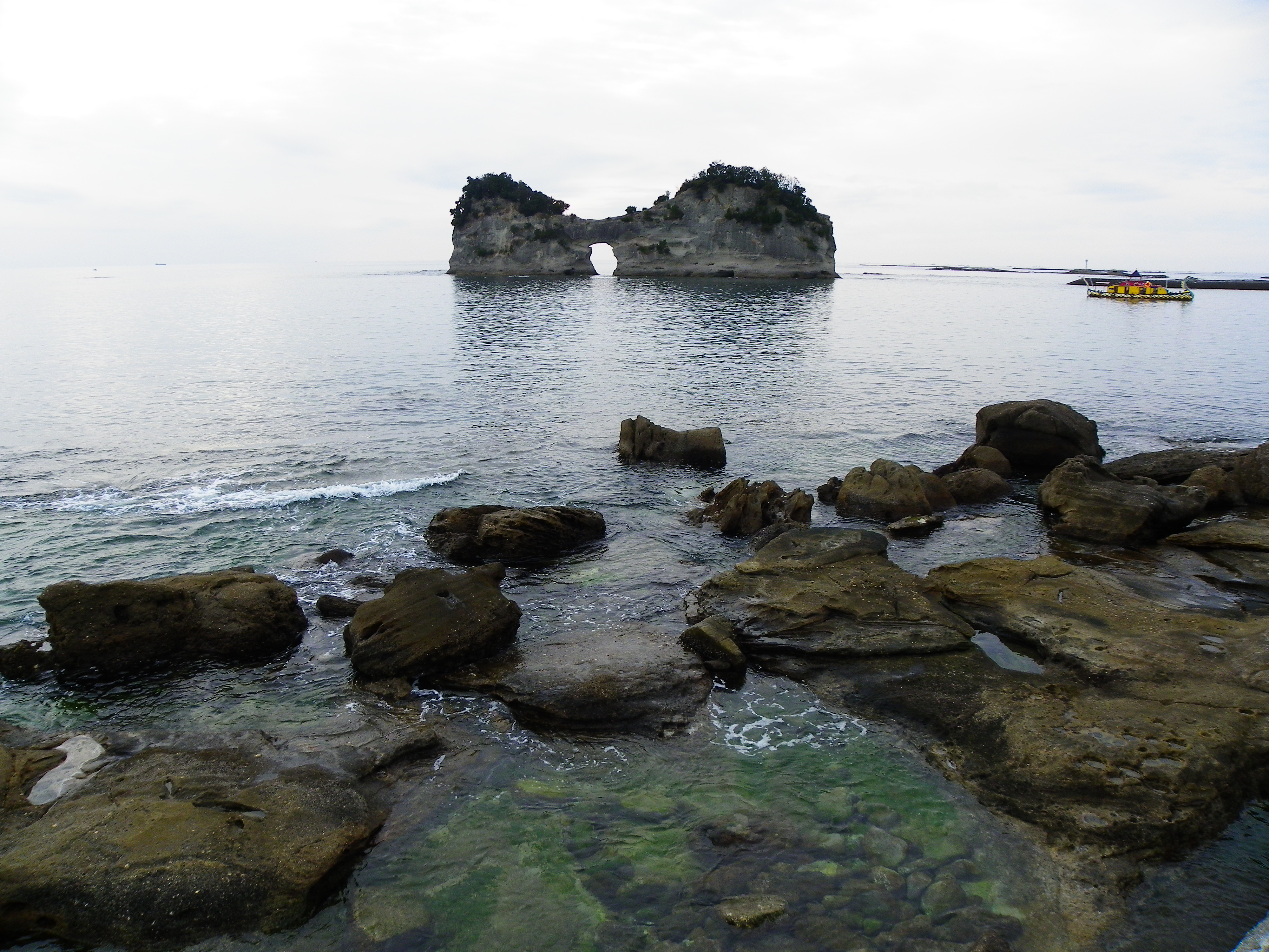 円月島の遠景。